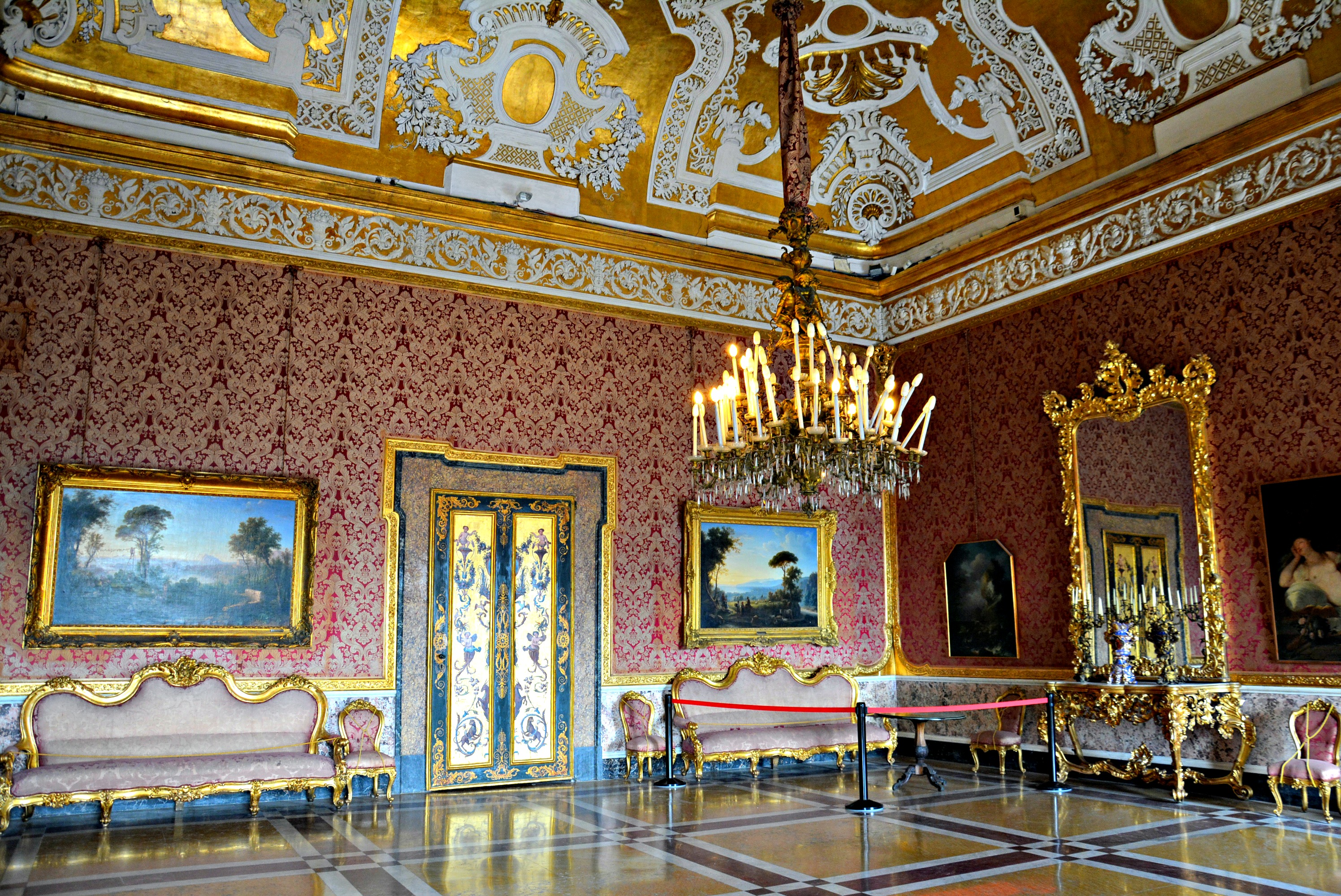 Vedi titolo